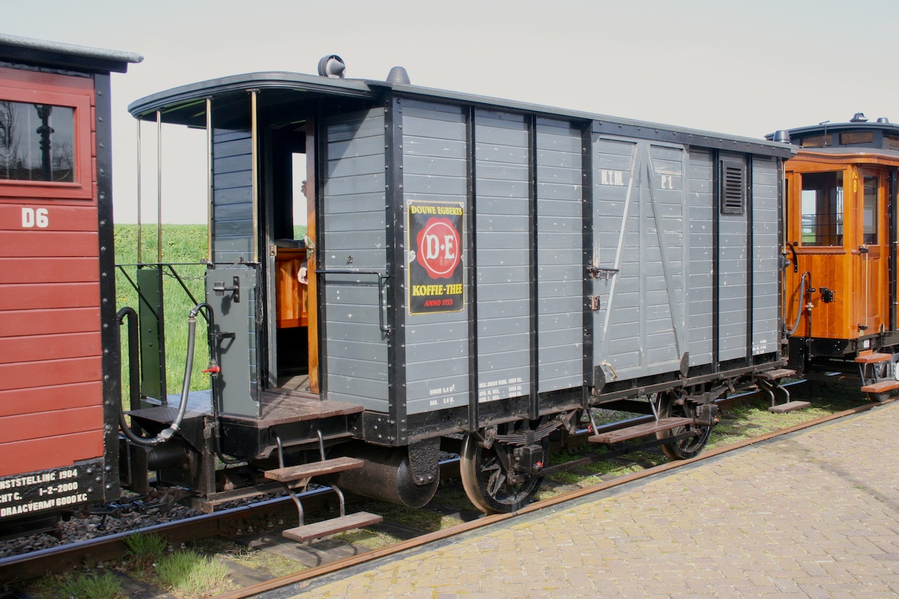 SHM goederenwagen P1 van de Nederlandse Tramweg Maatschappij, te Medemblik; 7 april 2012. Foto: Erik Swierstra.